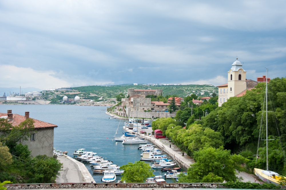 Kraljevica